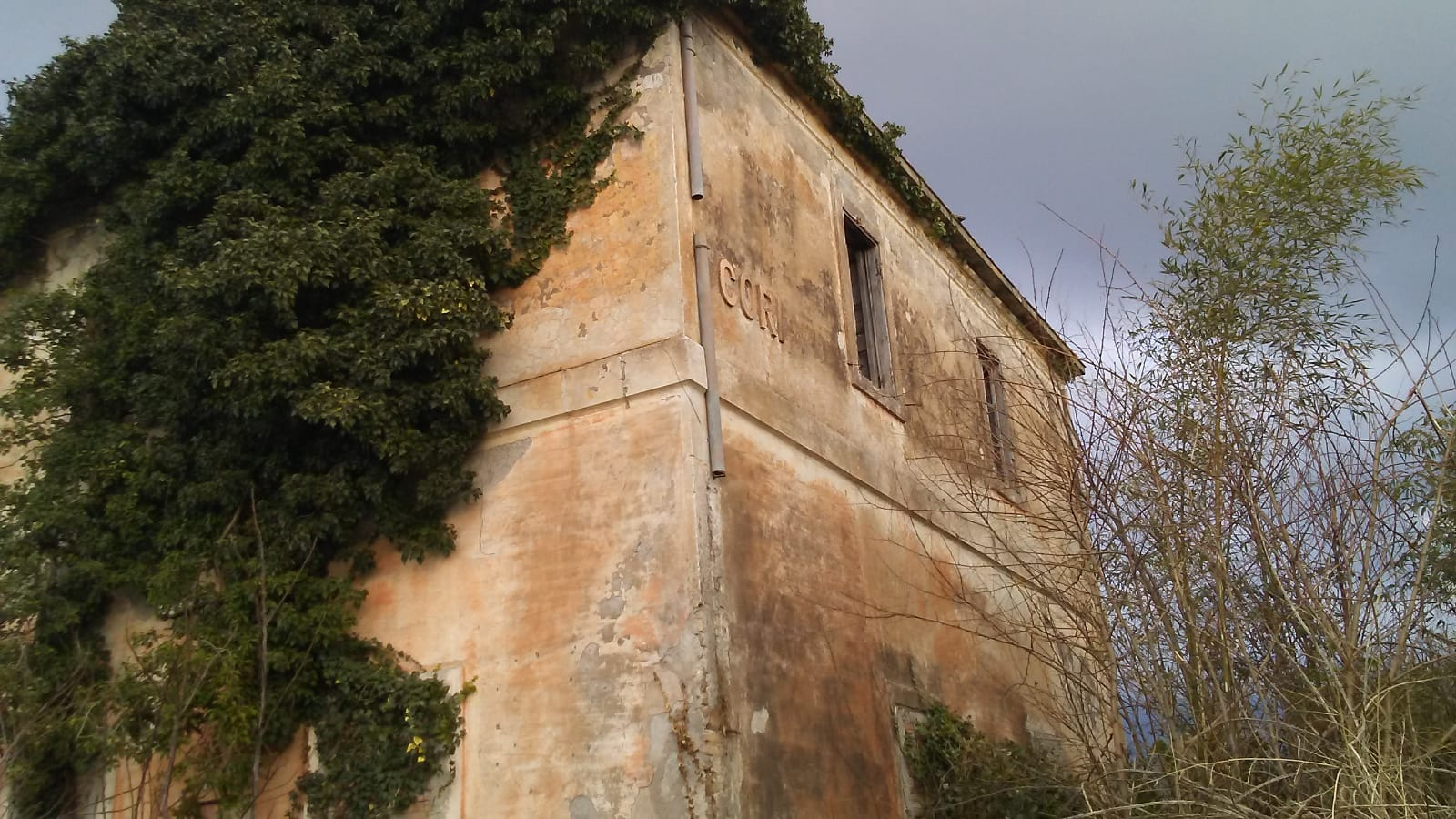 Fabbricato Viaggiatori della Stazione di Cori visto lato Terracina, sulla ferrovia Velletri-Terracina